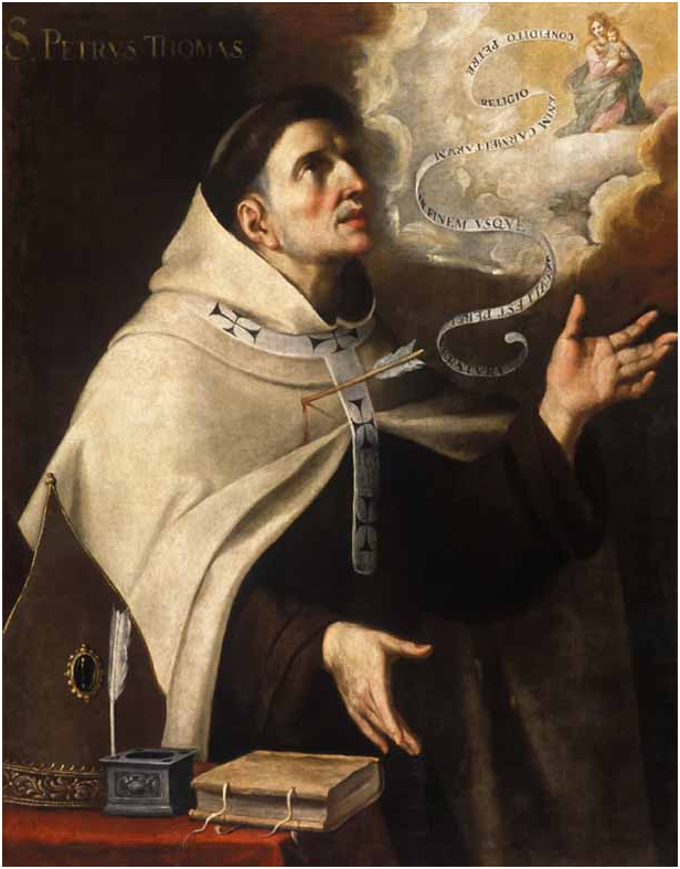 Брат Хуан дель Сантисимо Сакраменто, Святой Петр Тома (1670-1680), Музей изящных искусств, Кордова (Испания)